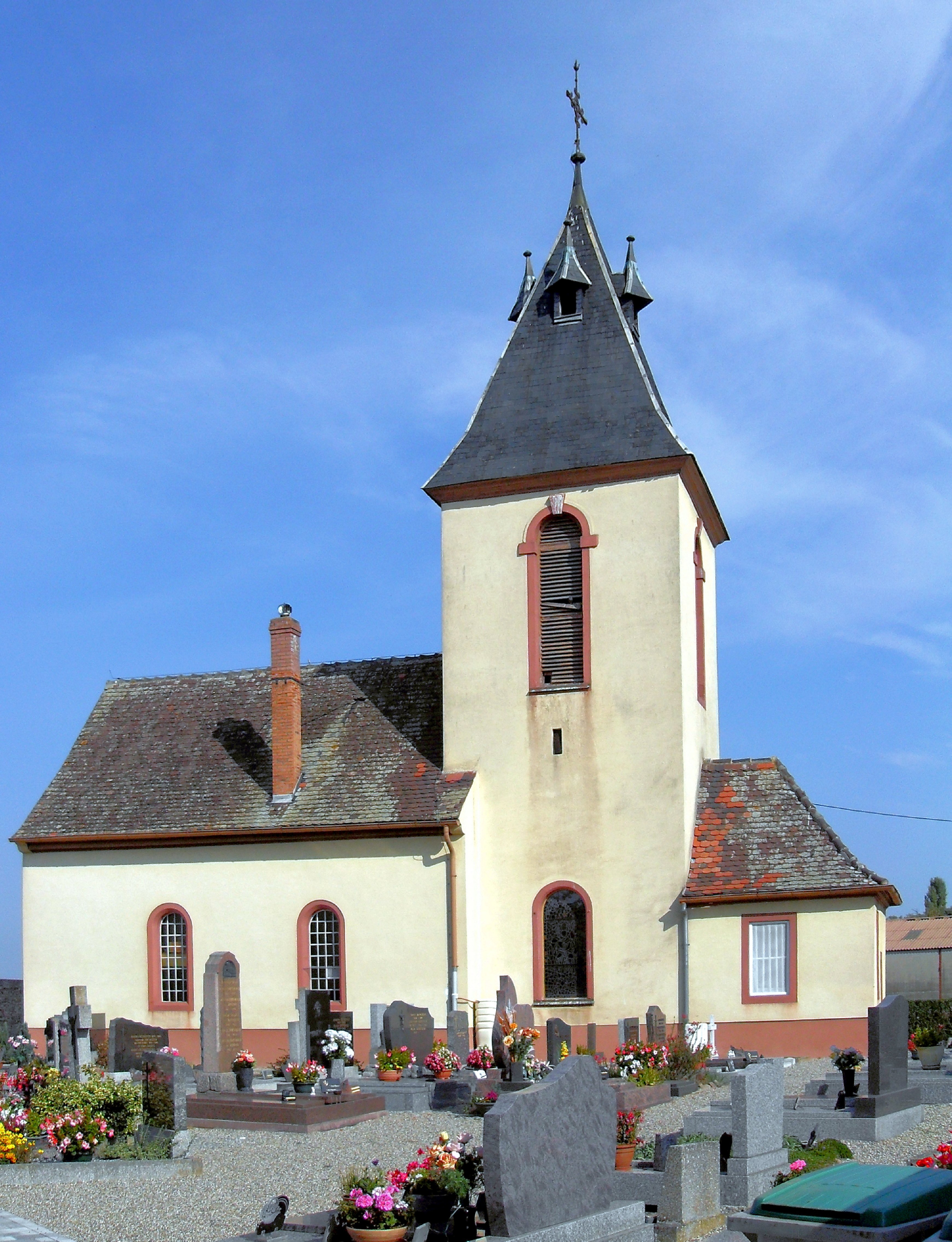 L'église protestante Saint-Antoine d'Appenwihr